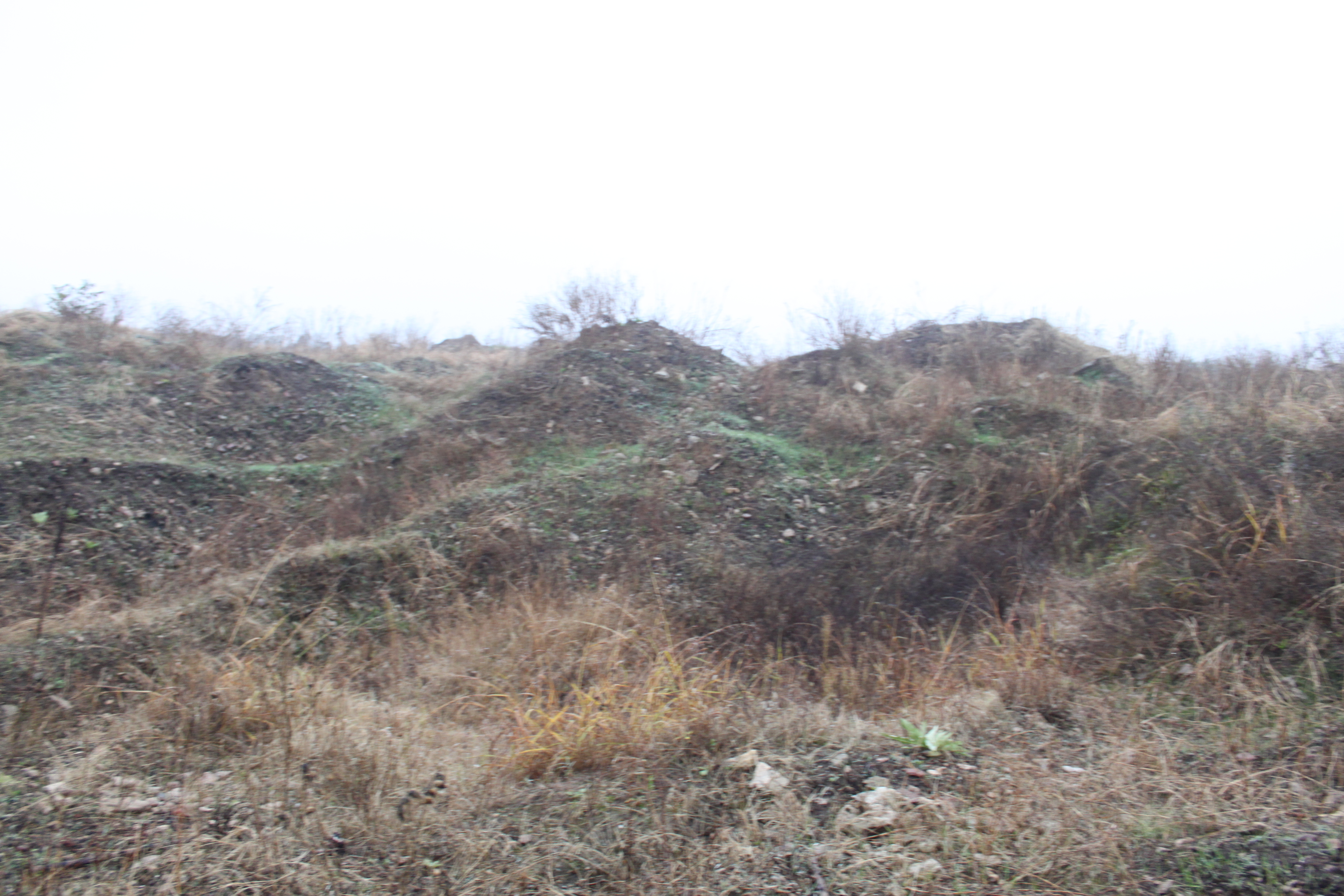 die antike römische Stadt Ratiaria; bei Archar an der Donau - östlich von Widin; das ca. 2 x2 km große Gelände wurde von Schatzsuchern monatelang systematisch mit Baggern umgegraben und druchsiebt, so dass alle archäologischen Schichten und Funde zerstört sind; nur an einer Stelle ist ein gemauerter Bogen übrig geblieben